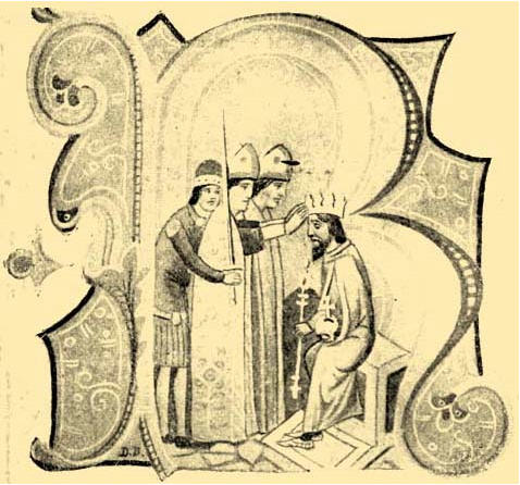 Béla IV. korunovace